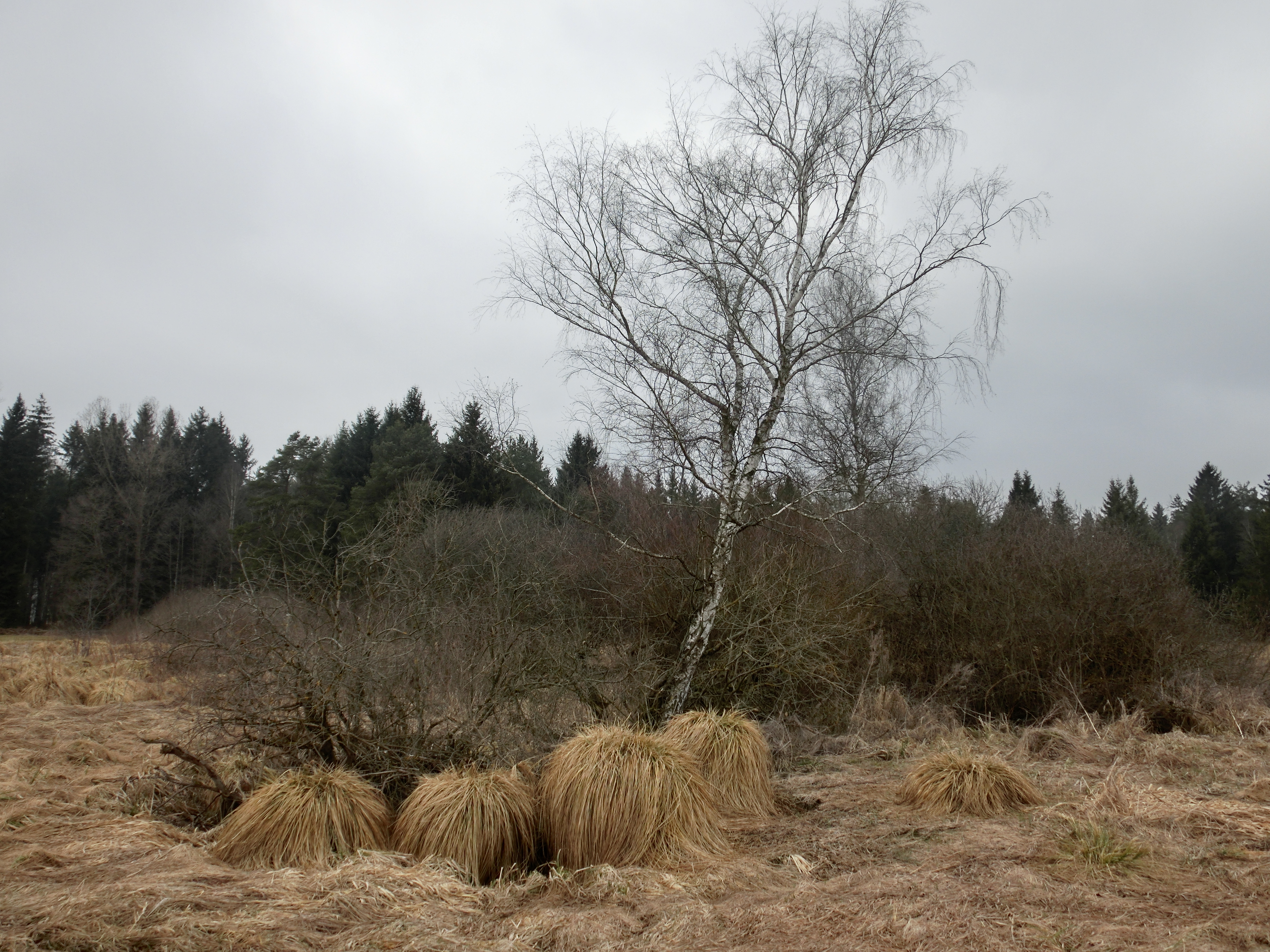 Deutschland - Baden-Württemberg - Landkreis Sigmaringen - Ostrach/Pfullendorf: Naturgschutzgebiet "Taubenried"